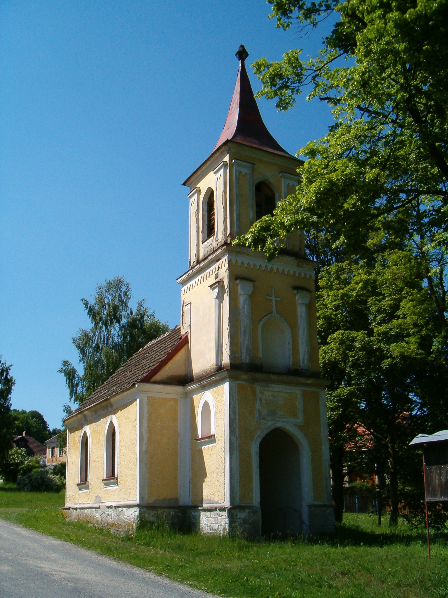 Kaplička v Dobrotíně